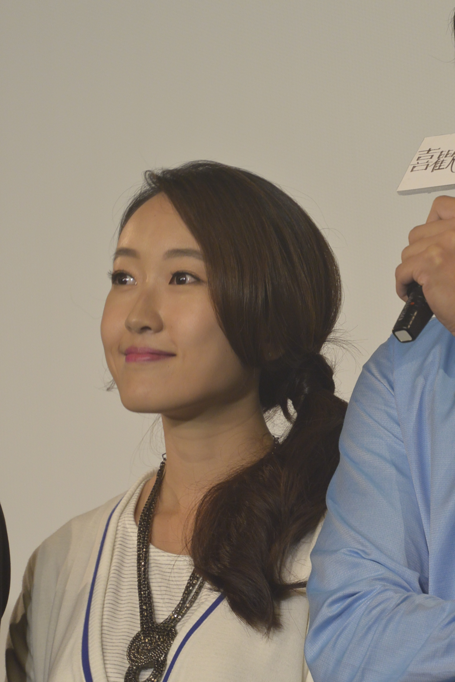 中文（台灣）: 喜歡．一個人《最終回》粉絲見面會